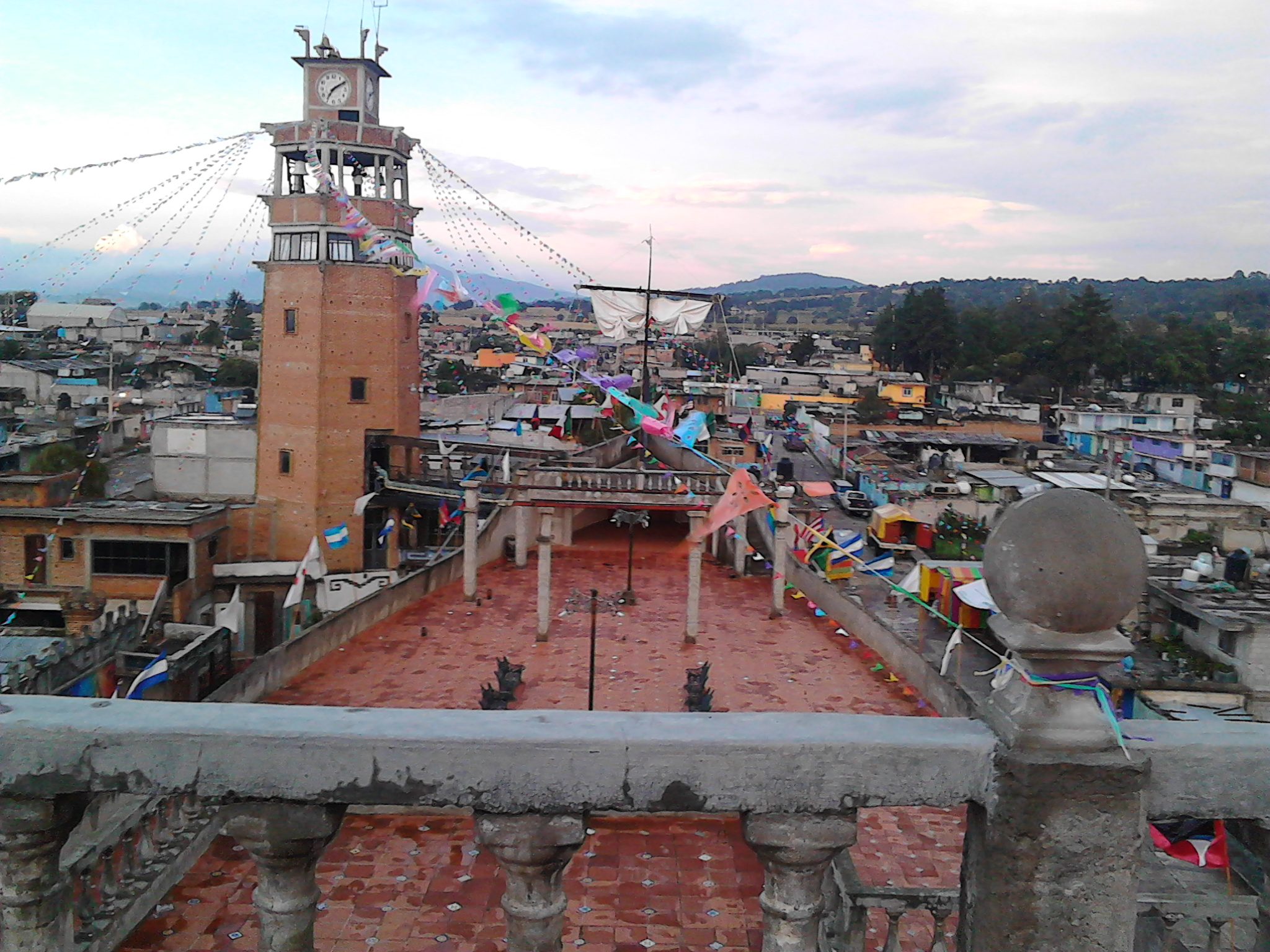 La Barca de la Fe, vista desde su piso superior.